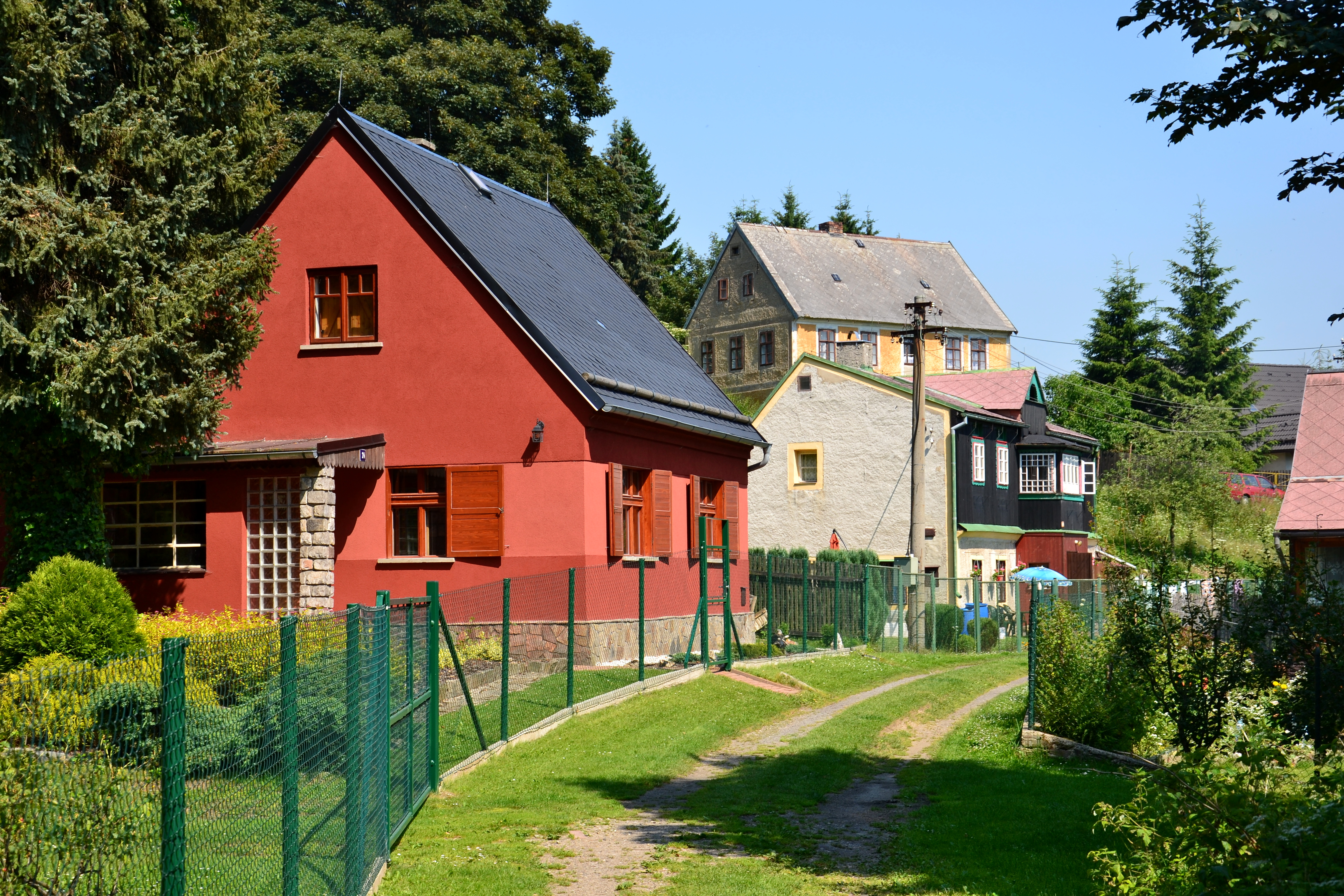 Ulice směrem k železniční zastávce